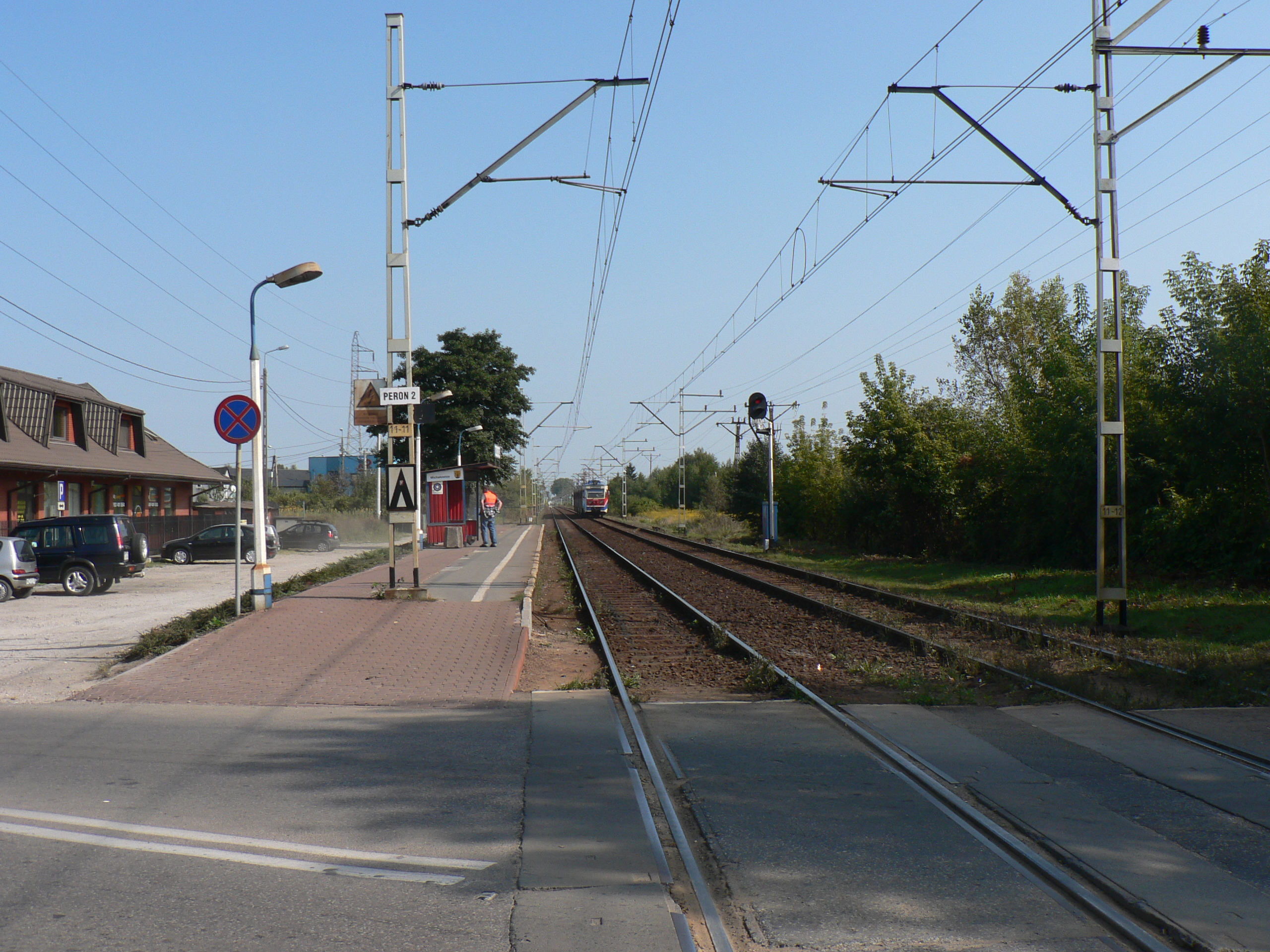 Stacja WKD w Michałowicach